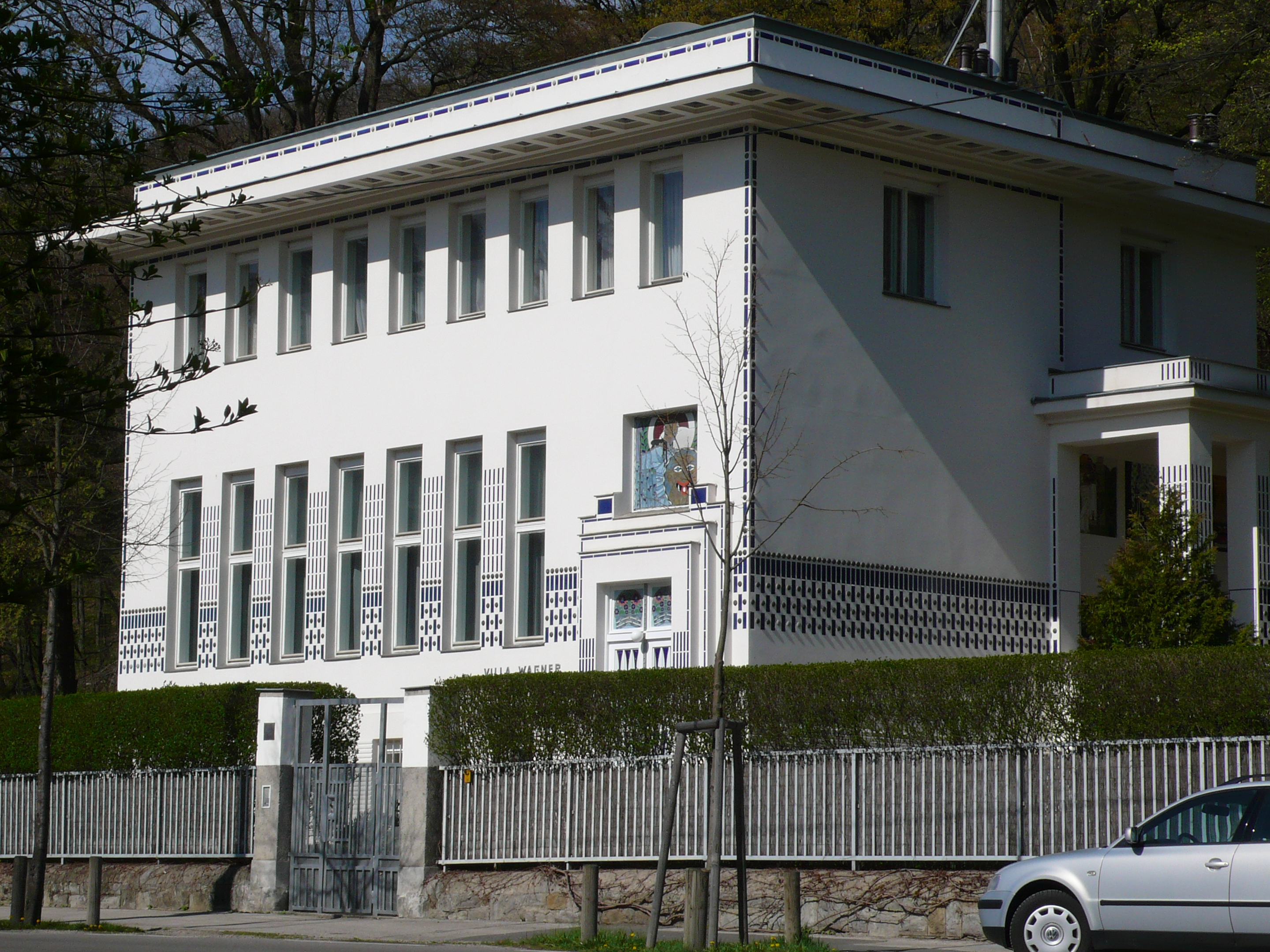 Zweite Wagner Villa, Wien, Otto Wagner